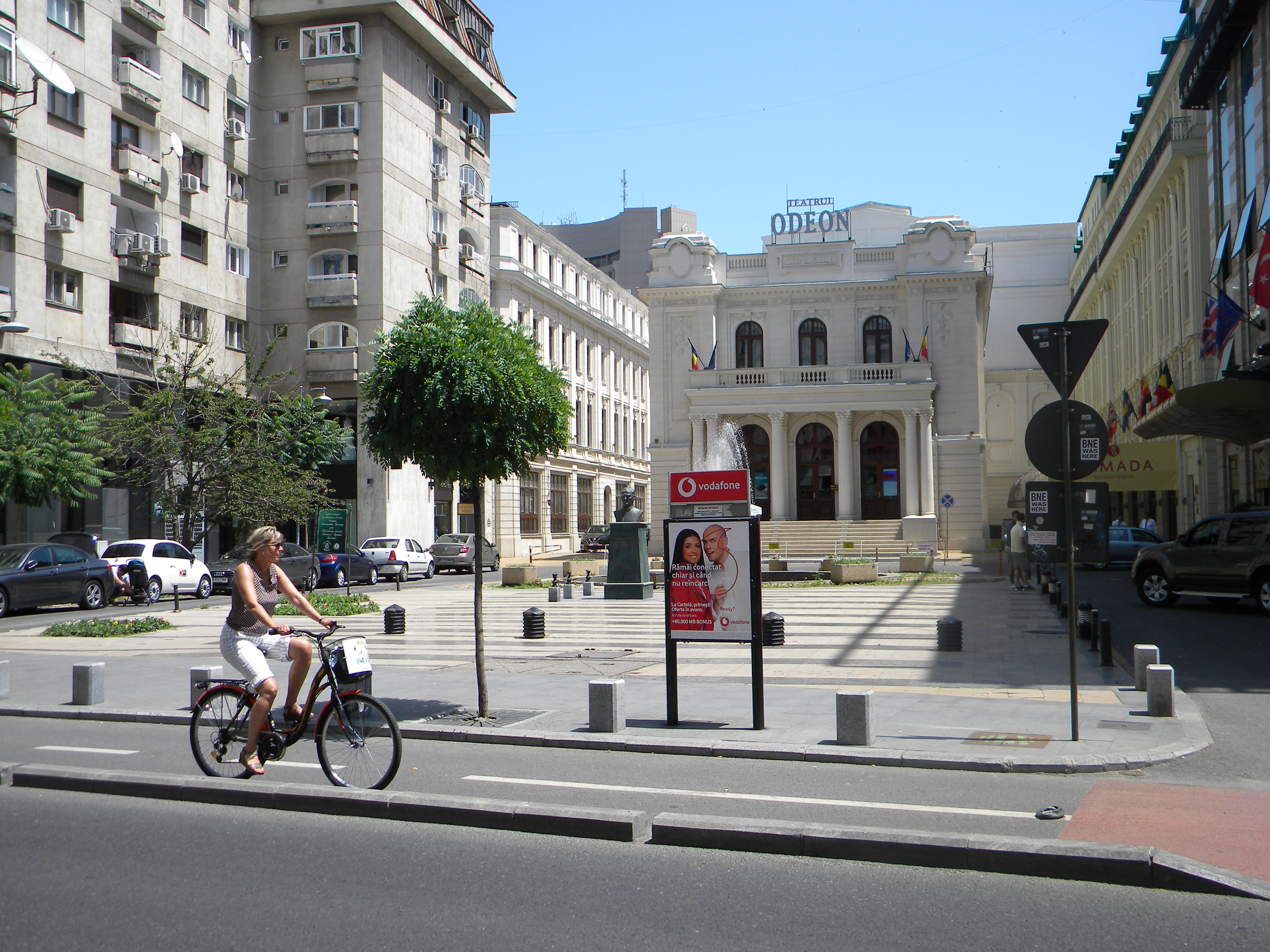 Bucuresti, Romania. Teatrul ODEON. Zi de vara. Biciclista. (B-II-m-B-19854). Fondat la 1 iulie 1946, s-a numit inițial Teatrul Muncitoresc C.F.R. Giulești. După 1990 și-a schimbat denumirea în Teatrul Odeon. Clădirea teatrului, care a fost ridicată în perioada interbelică, dispune de două săli de spectacol: - Sala Majestic, una din cele mai elegante săli de teatru din România și singura din Europa cu tavan glisant, are o scenă a l'italienne și o capacitate de 300 de locuri. - Sala Studio, care este situata la subsolul Teatrului Odeon, este flexibilă și multifuncțională, podeaua formată din platforme modulare permițând organizarea spațiului de joc și amplasarea publicului în diverse variante. În fața teatrului este instalat bustul lui Mustafa Kemal Atatürk.